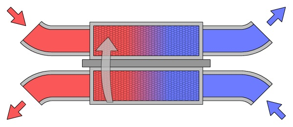 Figur på en växelflödes värmeväxlare Gjord av: Daniel Ryde, Skövde 2004-11-13